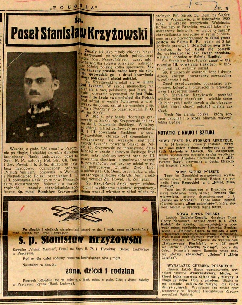 Wspomnieniowy tekst o śp. Stanisławie Krzyżowskim